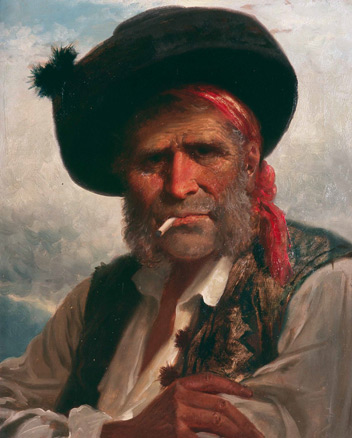 El viejo bandolero, óleo sobre lienzo del pintor Robert Kemm (1837 -1895)